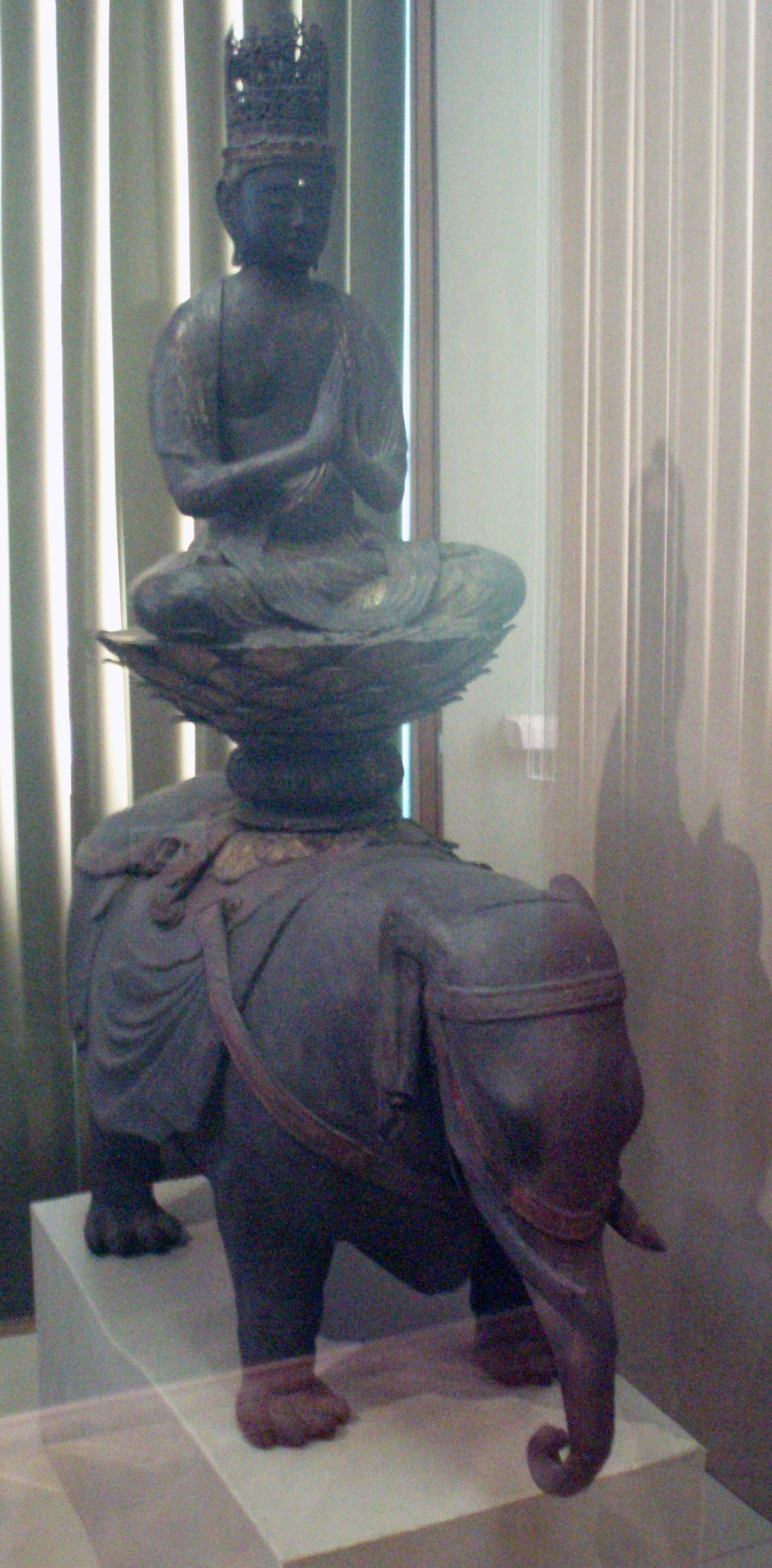 Бодхисаттва Фугэн на слоне. Япония. XII век. Дерево. 103 см. Государственный музей искусства народов Востока. Москва